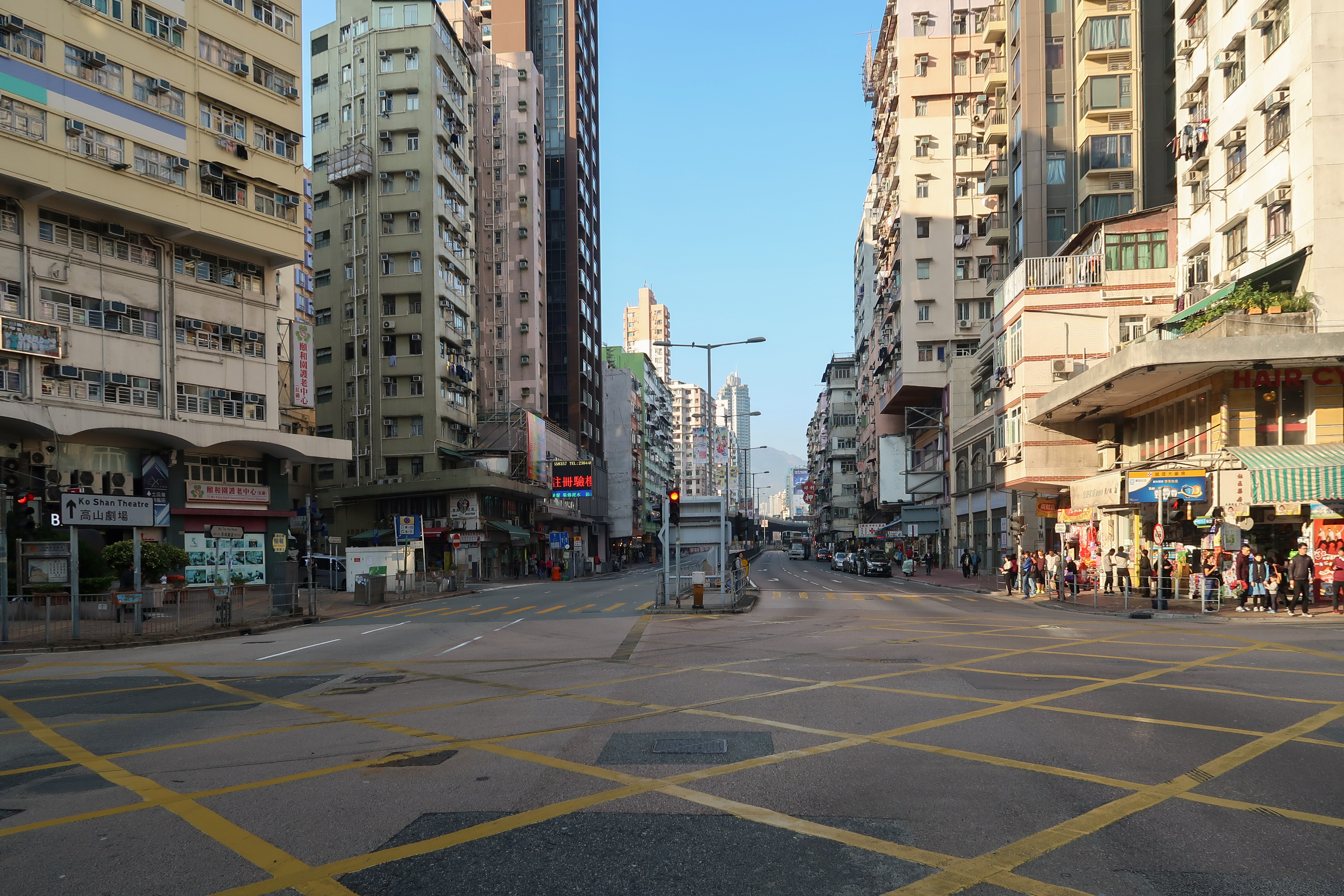 Ma Tau Wai Road